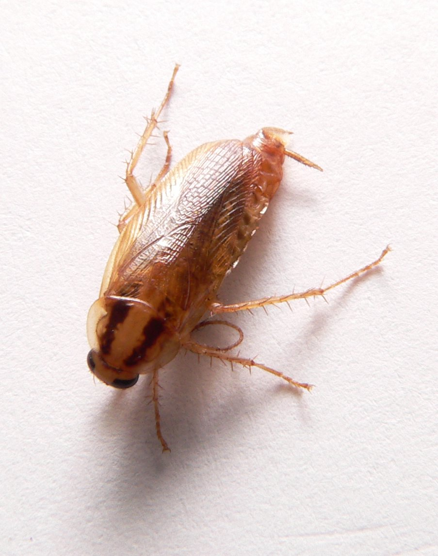 Blatella germanica